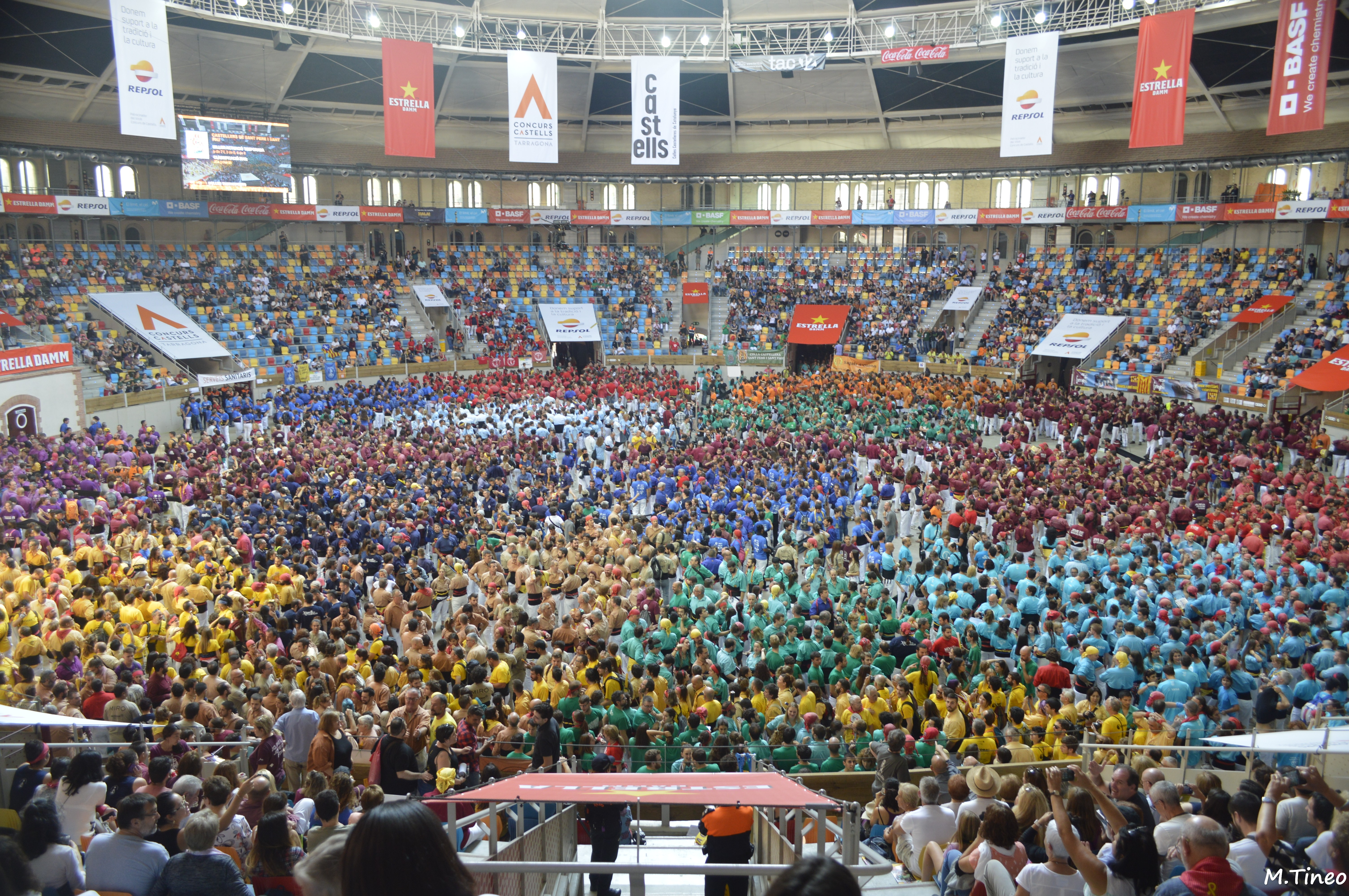 Aspecte de la plaça durant la jornada de dissabte del XXVII Concurs de castells de Tarragona, dissabte 6 d'octubre.